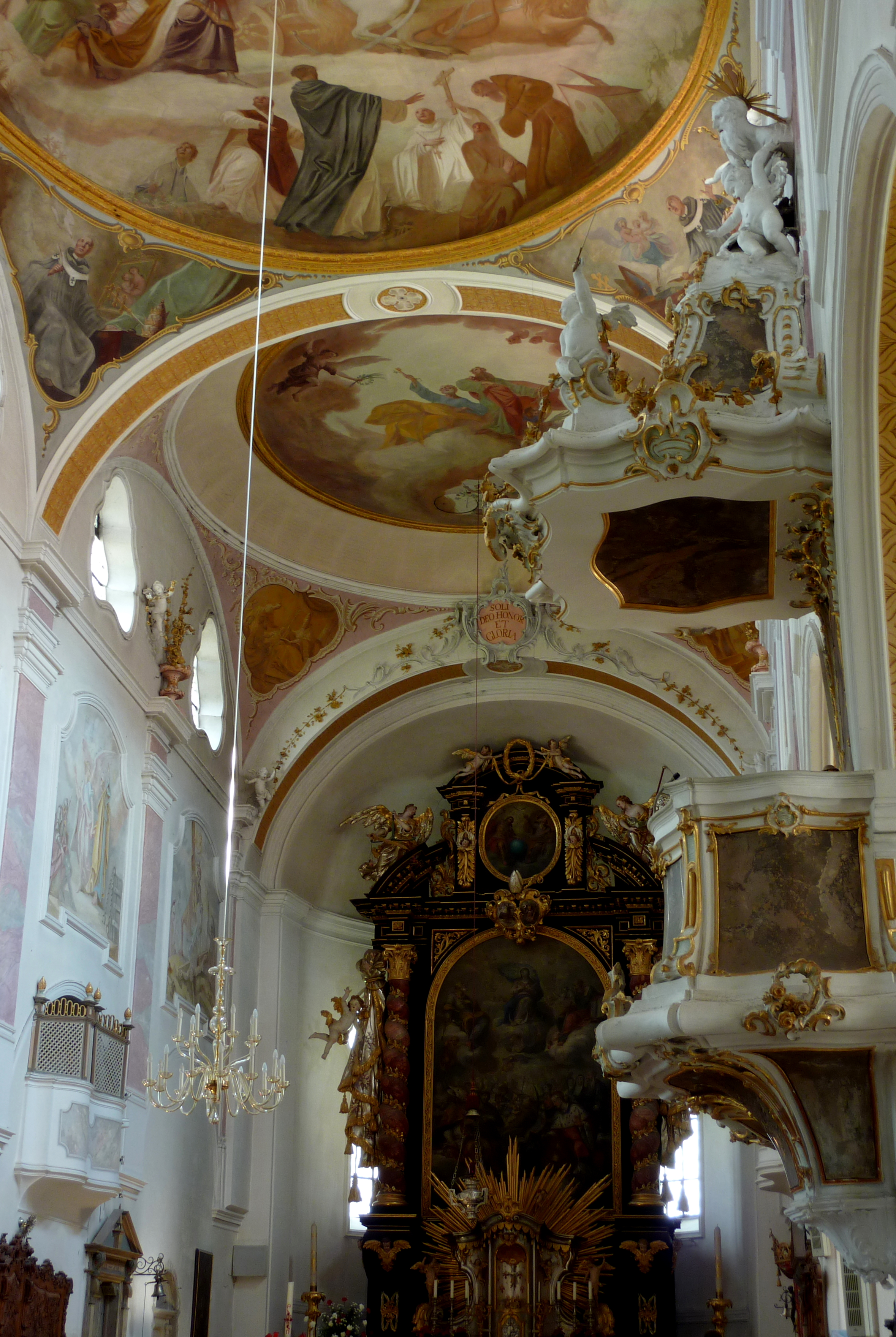 Katholische Pfarrkirche St. Peter und Paul (ehemalige Abteikirche des Klosters Thierhaupten) in Thierhaupten, einer Gemeinde im Landkreis Augsburg, Innenansicht mit Blick zum Hauptaltar